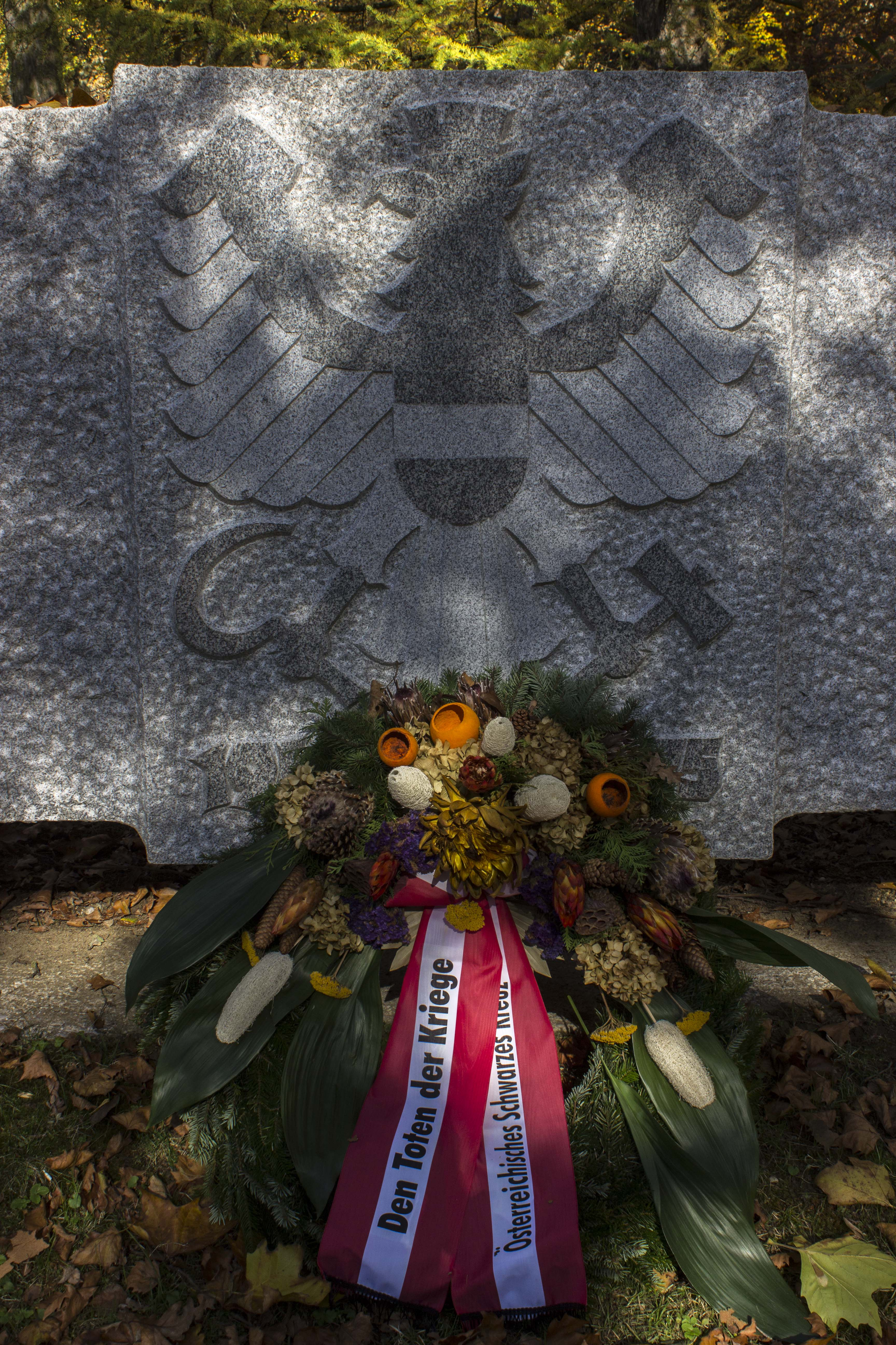 Kranz des Österreichischen Schwarzen Kreuzes am Denkmal für die Vertriebenen auf dem Pöstlingsberg in Linz